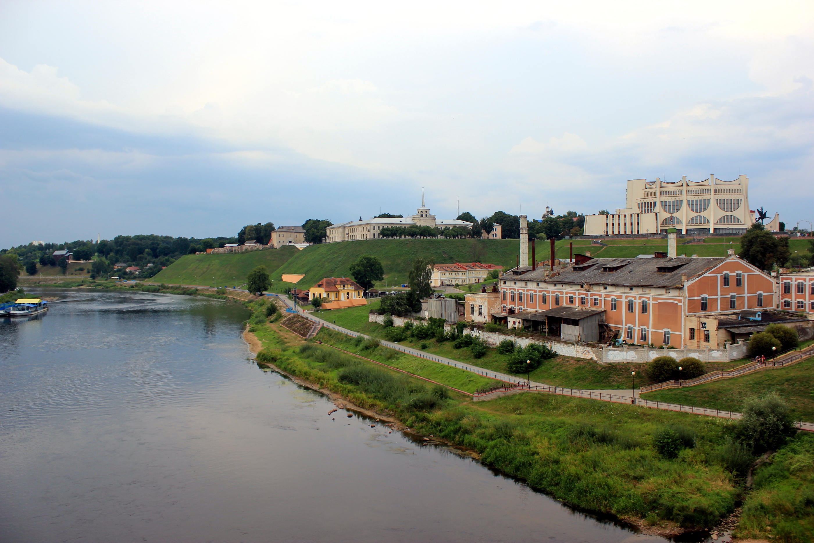 Die Memel in Hrodna, Belarus.